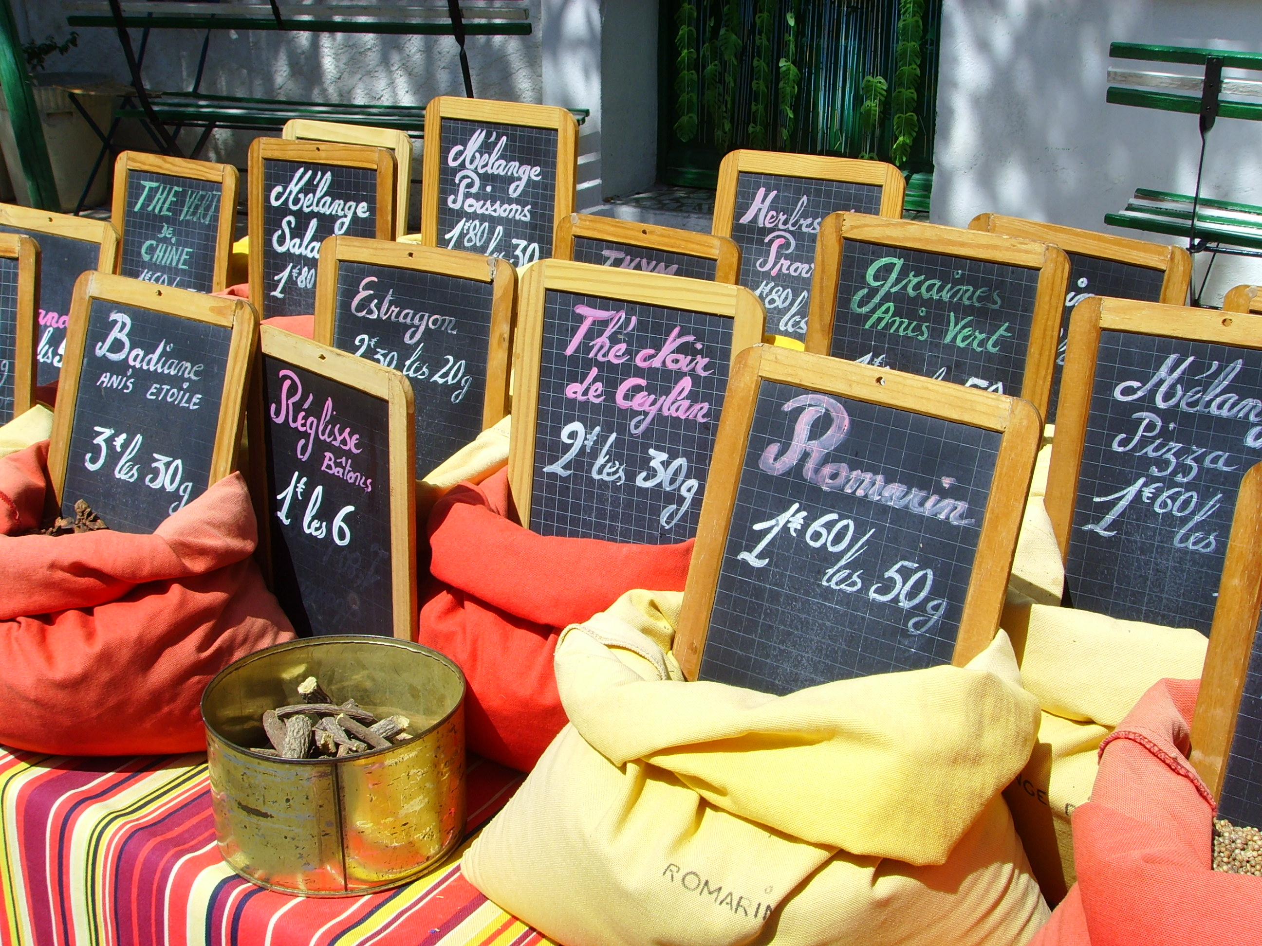 Leucate, Aude, France: Leucate Village photographer: Gerbil, summer 2006